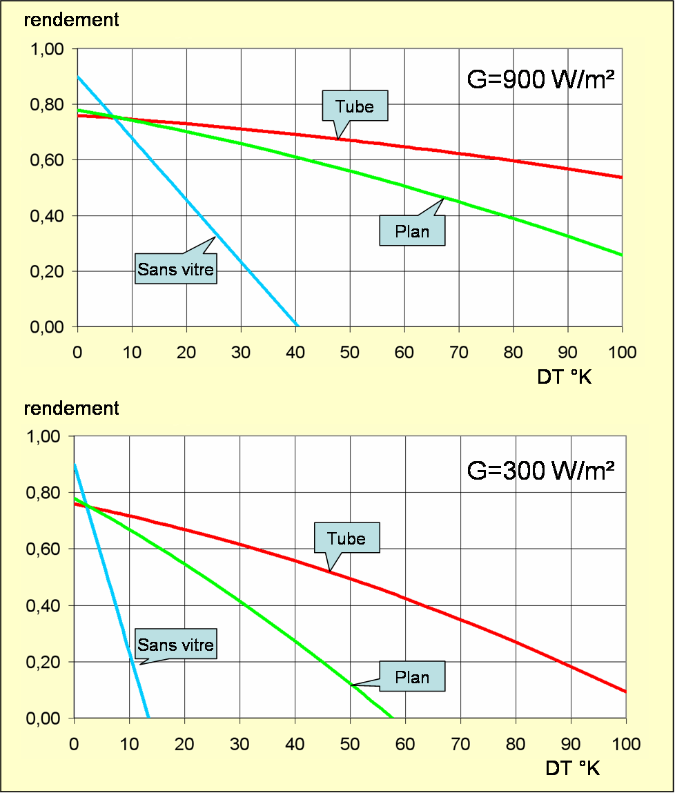 Exemples de courbes de rendement de capteurs solaires thermiques typiques